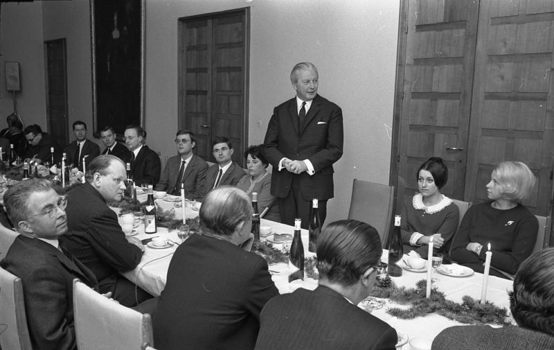 Weihnachtsfeier mit Bundeskanzler Kiesinger und den Angehörigen des Bundeskanzleramtes im Bundeskanzler Amt